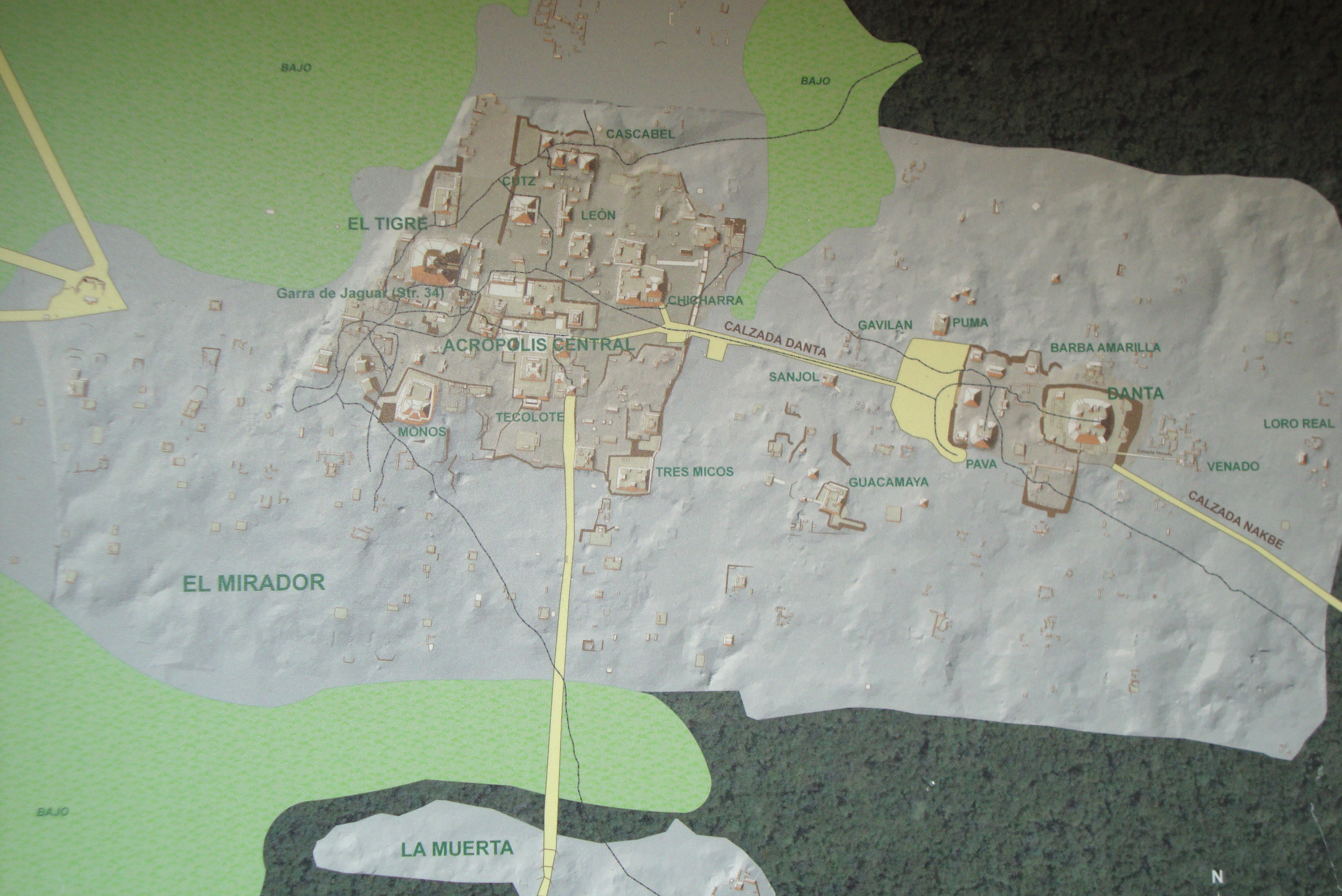 Fotografía del mapa de El Mirador en Carmelita, San Andrés, Petén (información al público)